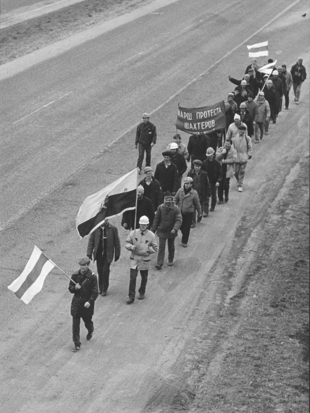 Поход на Минск солигорских шахтеров, 1992 год